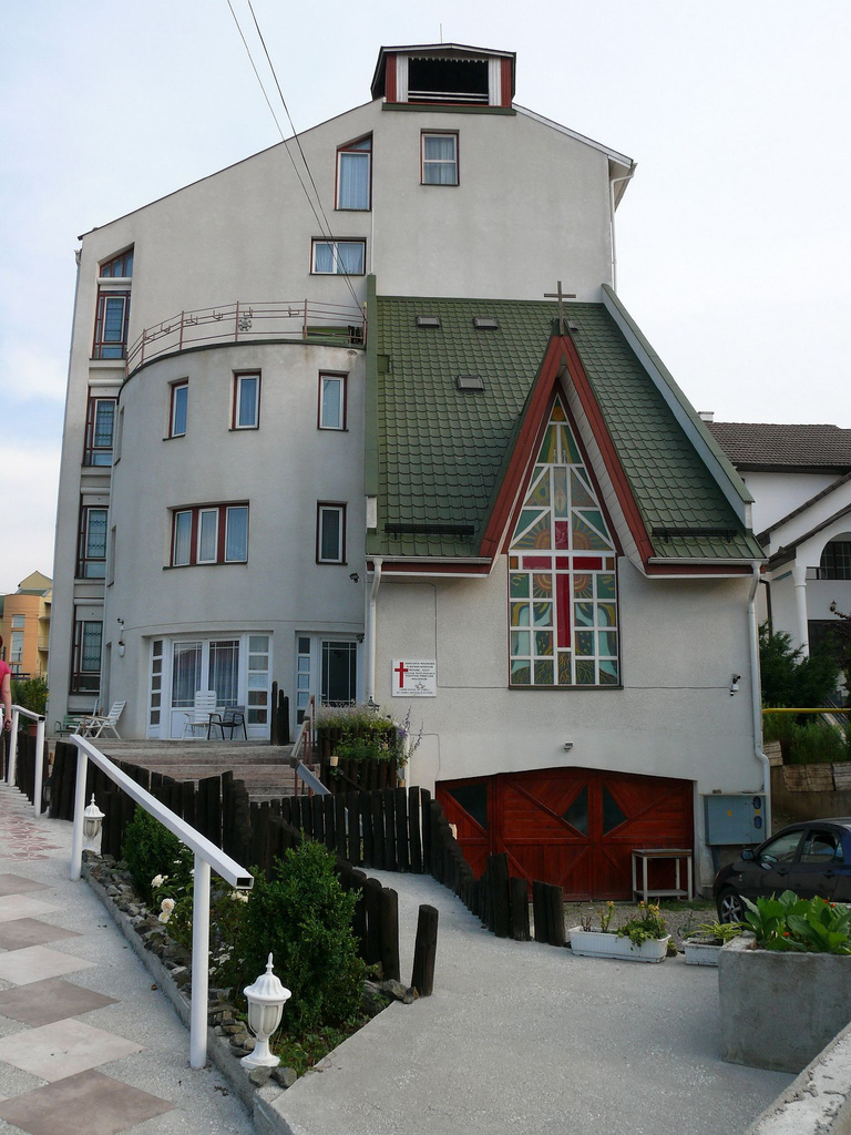 Cluj-Napoca, Azilul ”Sfântul Kamil”, cartierul Zorilor (str.Pădurii nr.11)